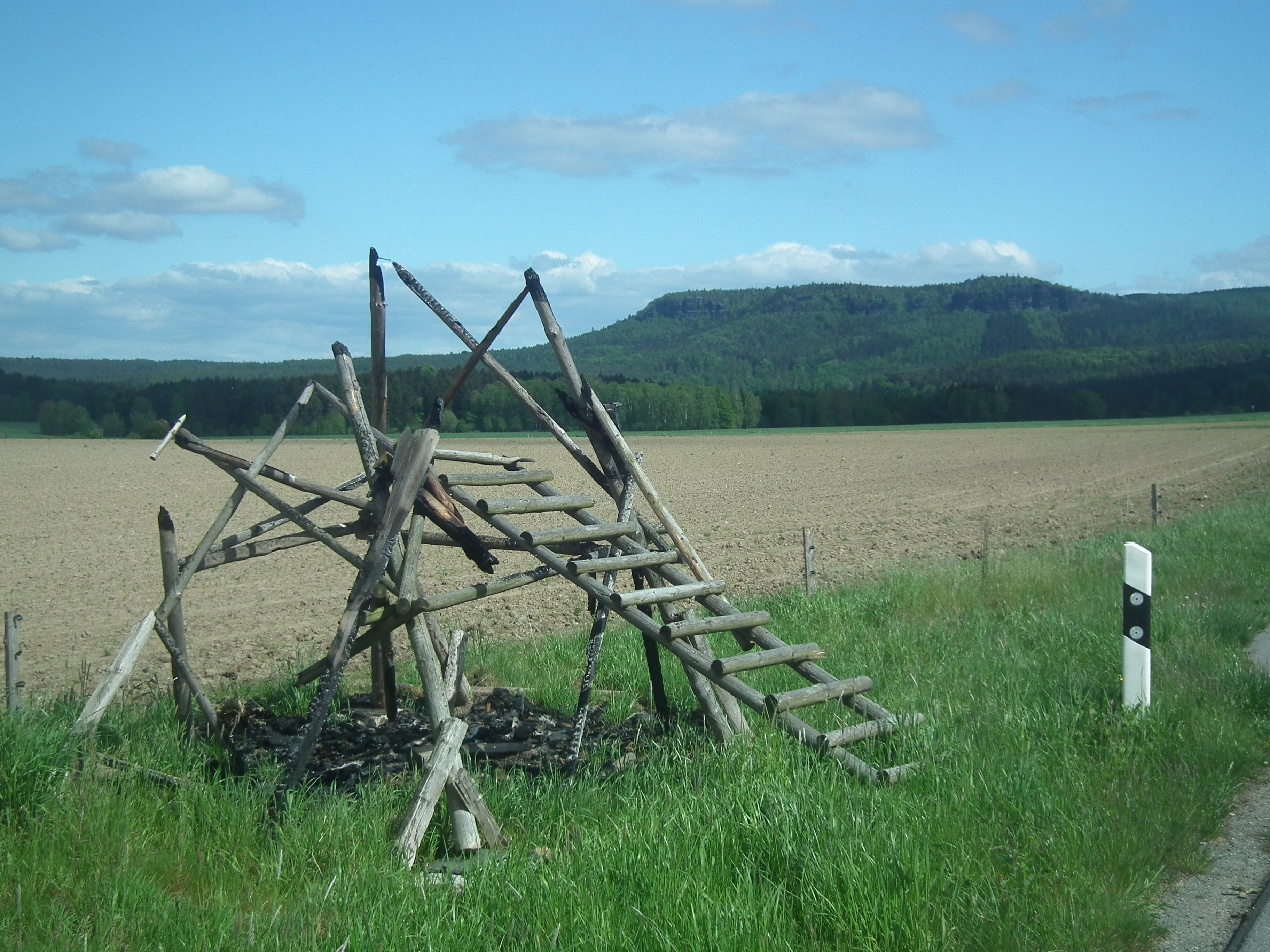 Blick Richtung Großen Zschirnstein, abgebrannter Hochsitz